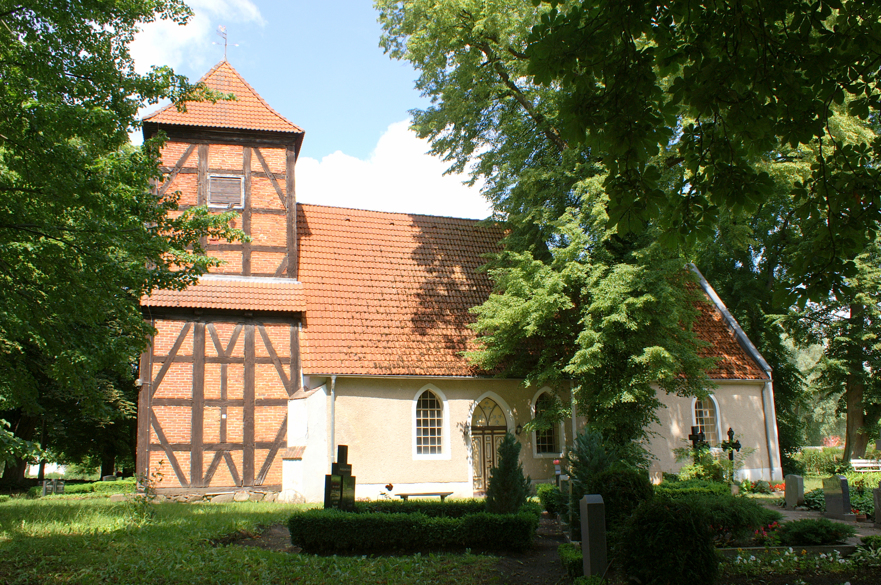 Kirche in Blesewitz, Südseite